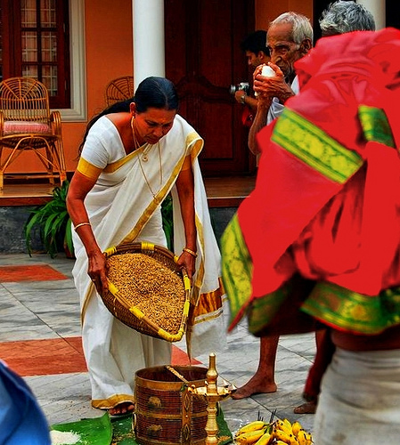 ക്ഷേത്രോസ്തവങ്ങളോടനുബന്ധിച്ച് നടക്കുന്ന പറയെടുപ്പിൽ പറ നിറക്കുന്ന ഒരു കേരളീയ സ്ത്രീ.